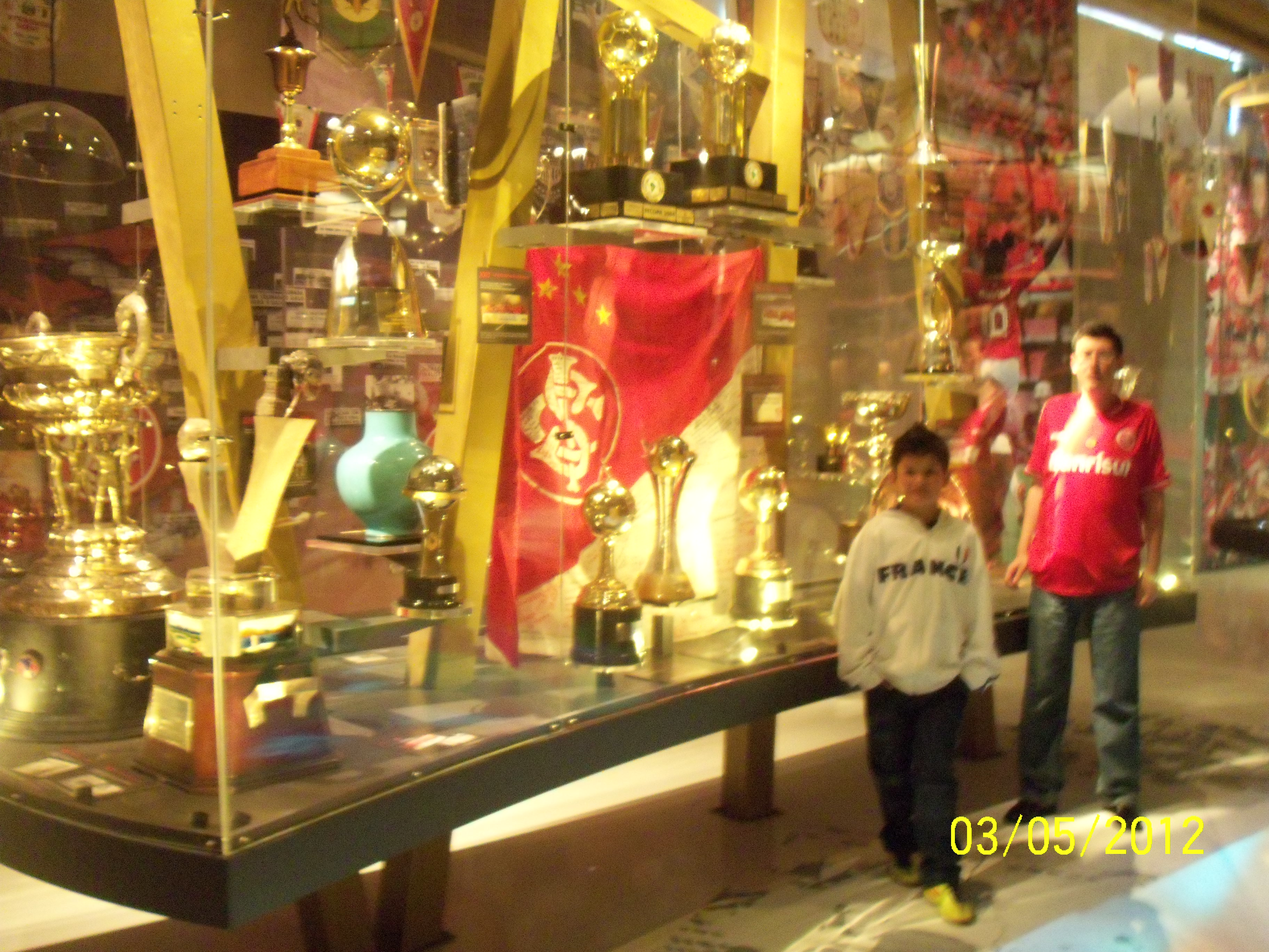 Sala de Troféus do Sport Club Internacional de Porto Alegre-RS (BRA),Eu e meu sobrinho Guilherme.